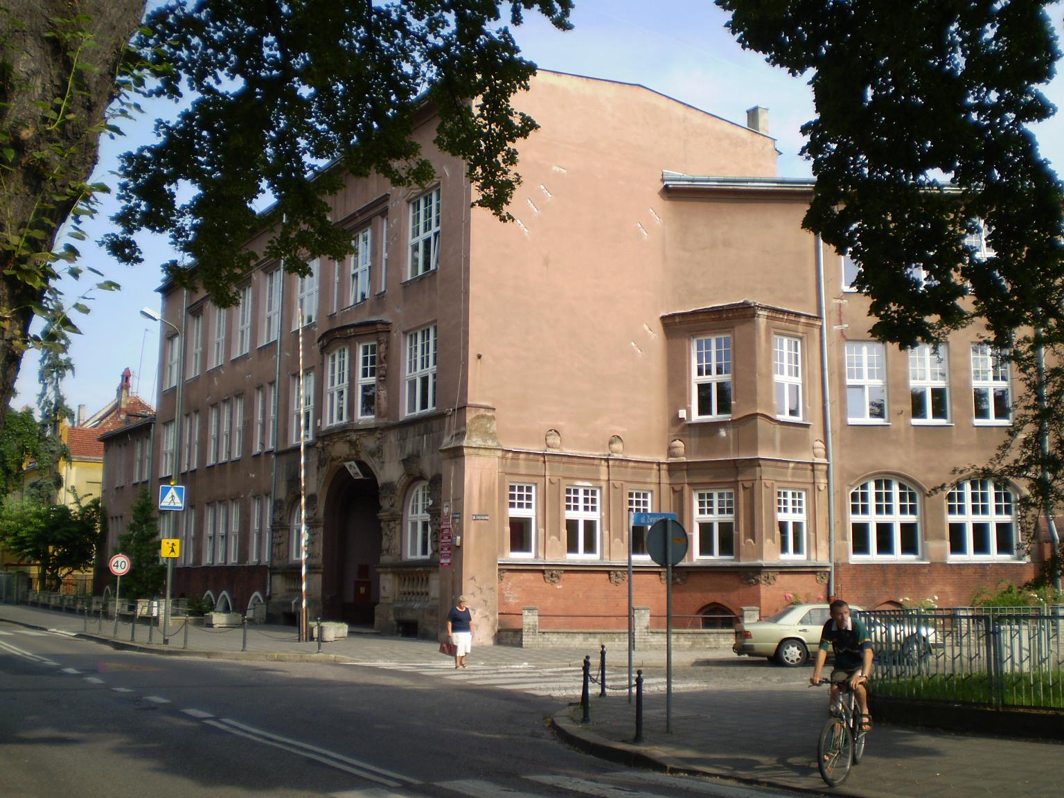 dom XIX/XX Gubin, ul. Piastowska 26, Gubin 04.1977.